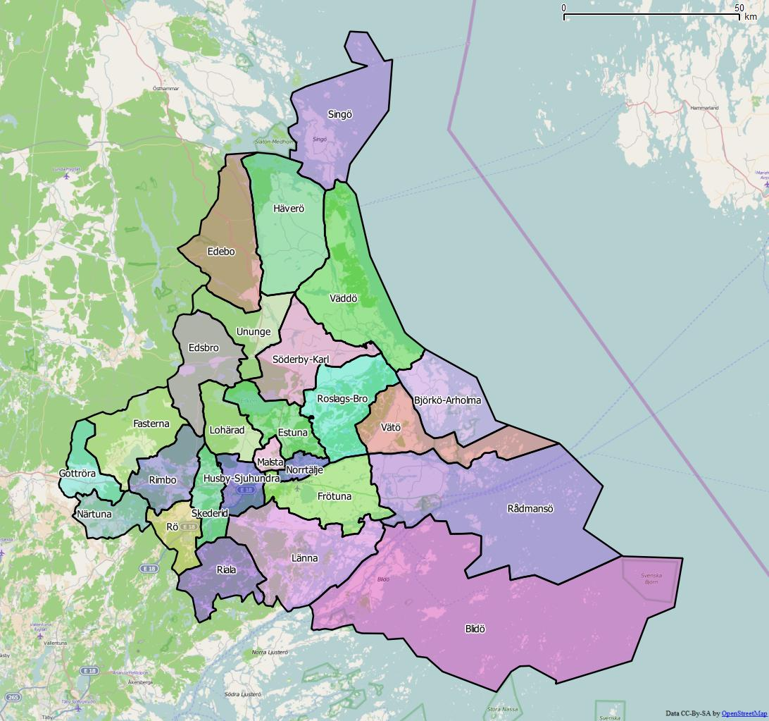 Distriktsindelningen i Norrtälje kommun World file: 200.67585807886860039 0 0 -200.67585807886860039 1996566.97253511915914714 8479502.47454779408872128